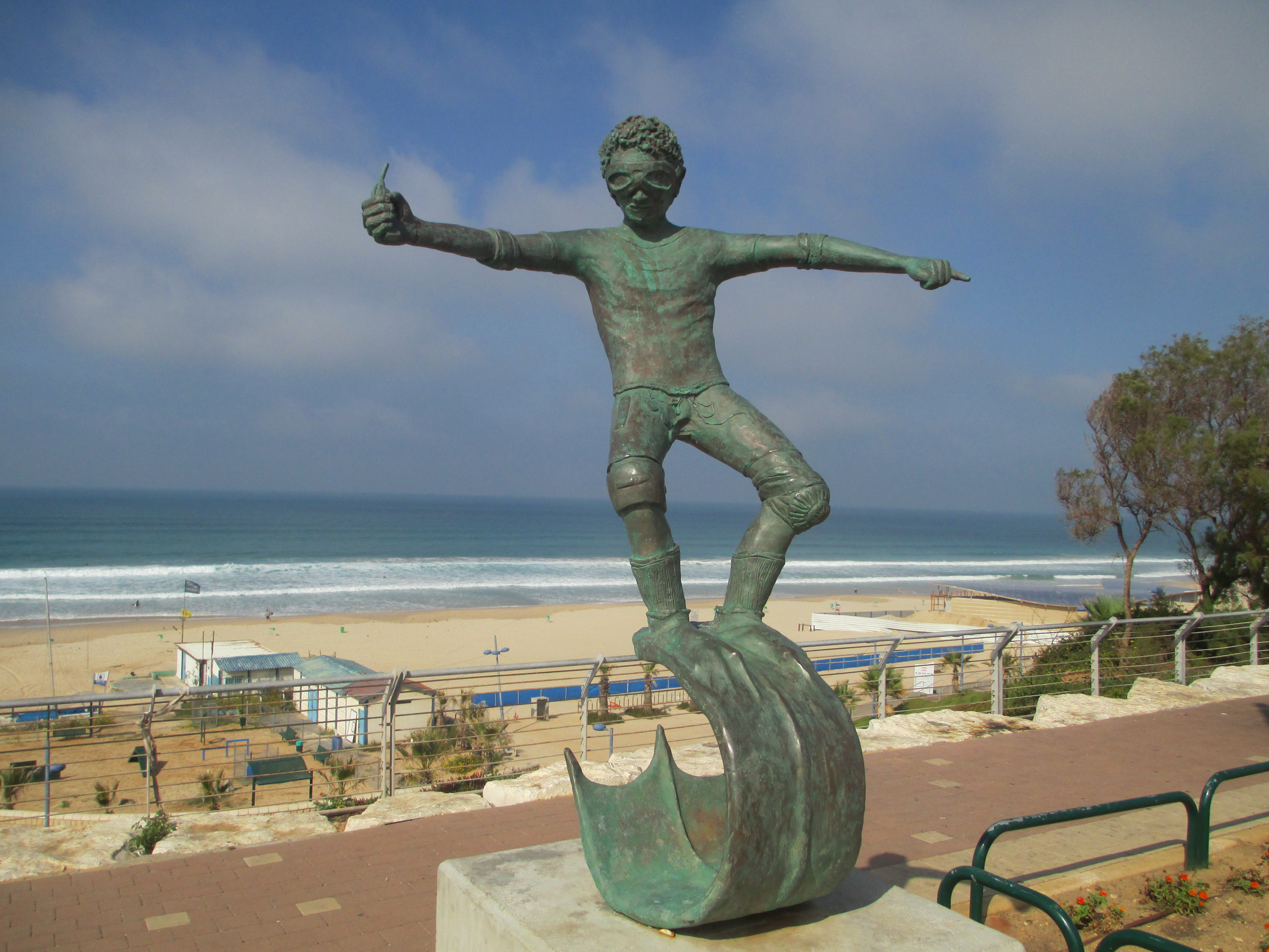 הפסל עליה לראש הגל בחוף ראשון לציון